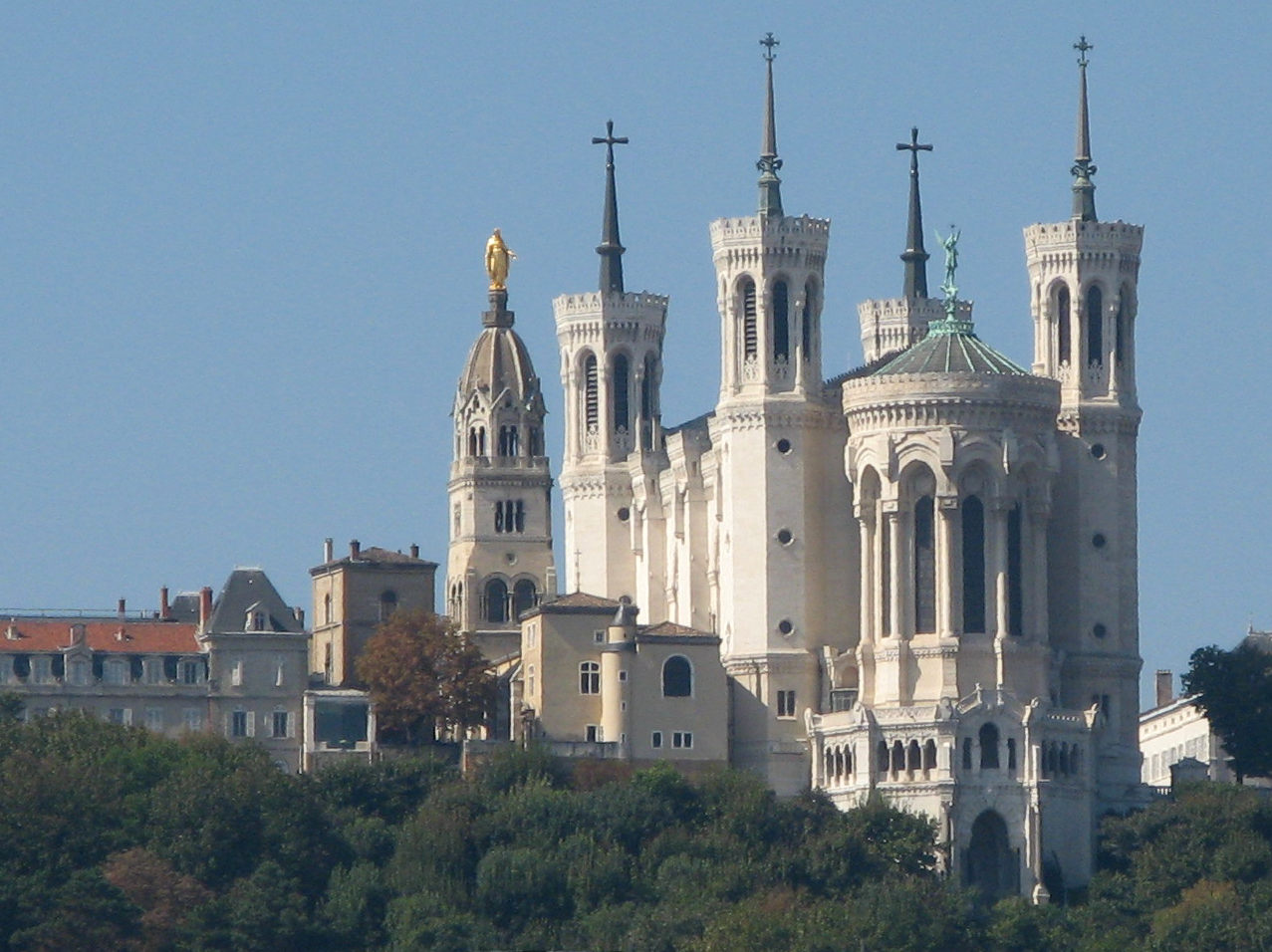 Basilique de Fourvière (Lyon) vue de la Saône